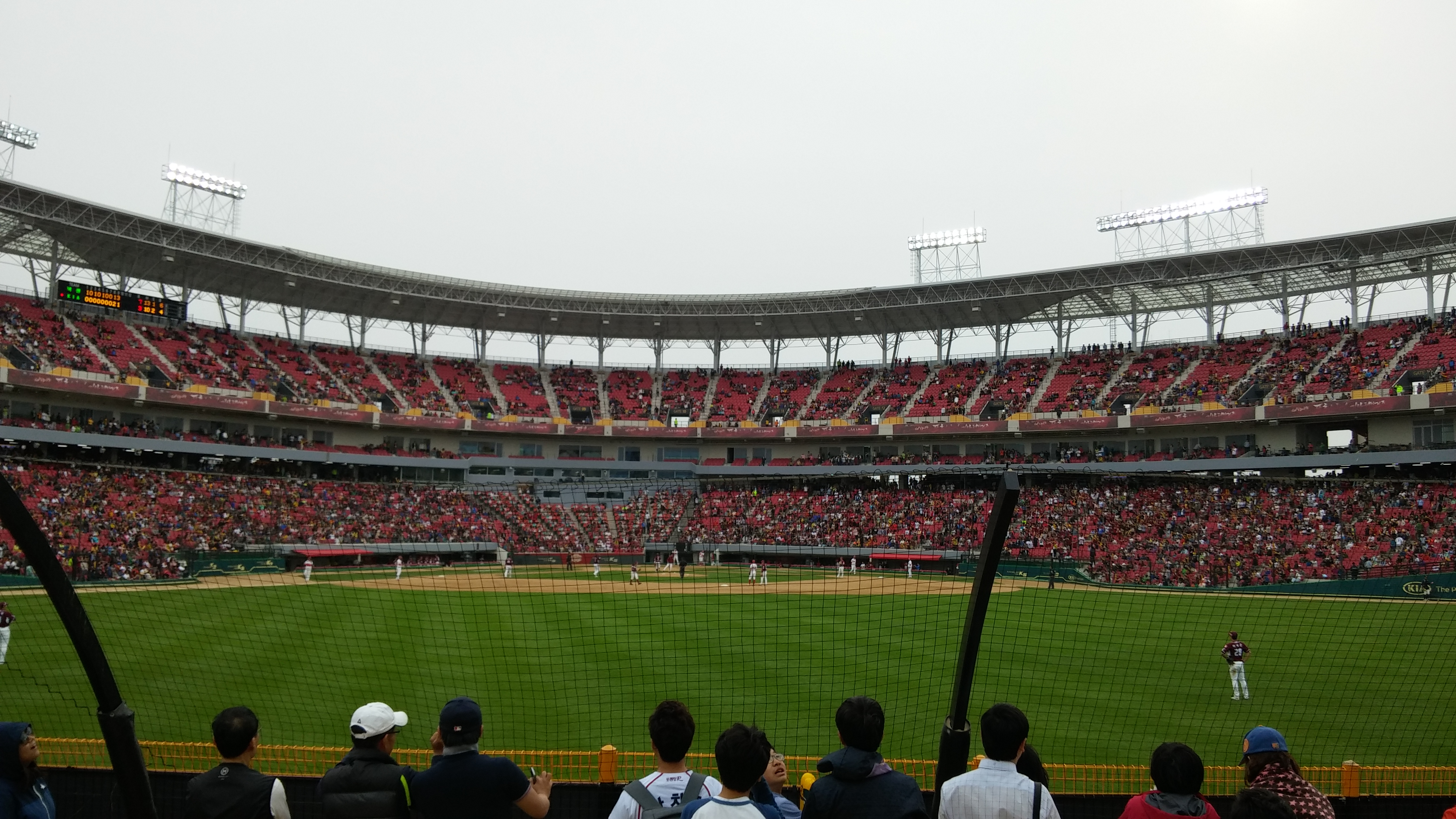 외야에서 홈쪽을 바라본 모습